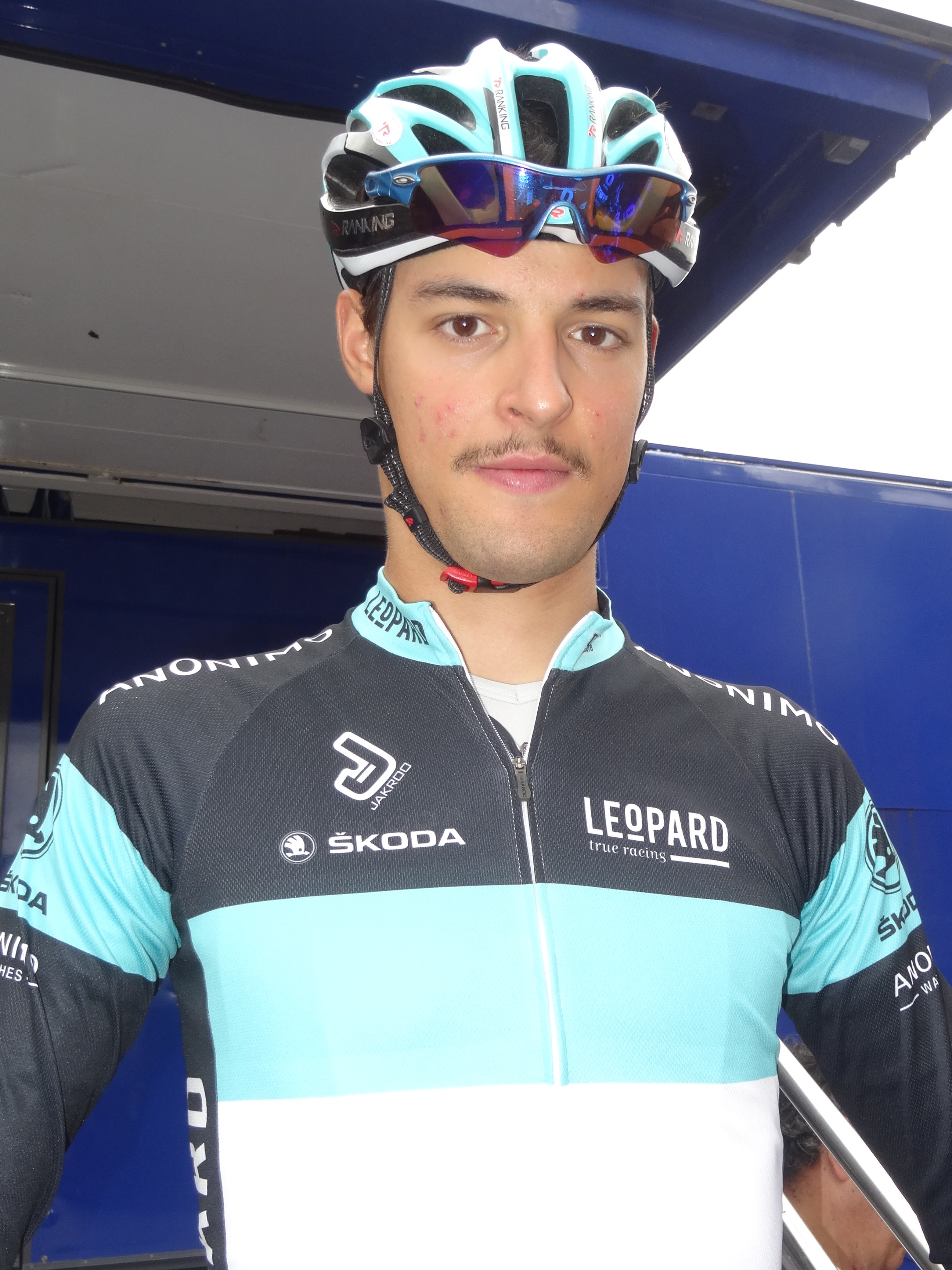 Reportage photographique réalisé le dimanche 13 juillet à l'occasion du départ et de l'arrivée de la Ronde pévéloise 2014 à Pont-à-Marcq, Nord-Pas-de-Calais, France.